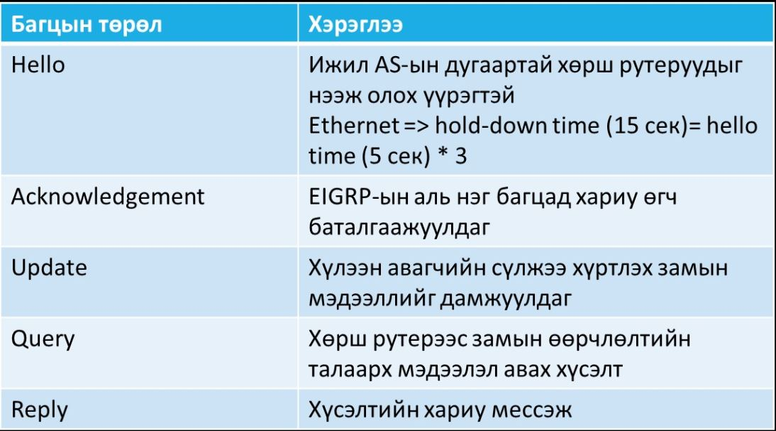 Монгол: eigrp